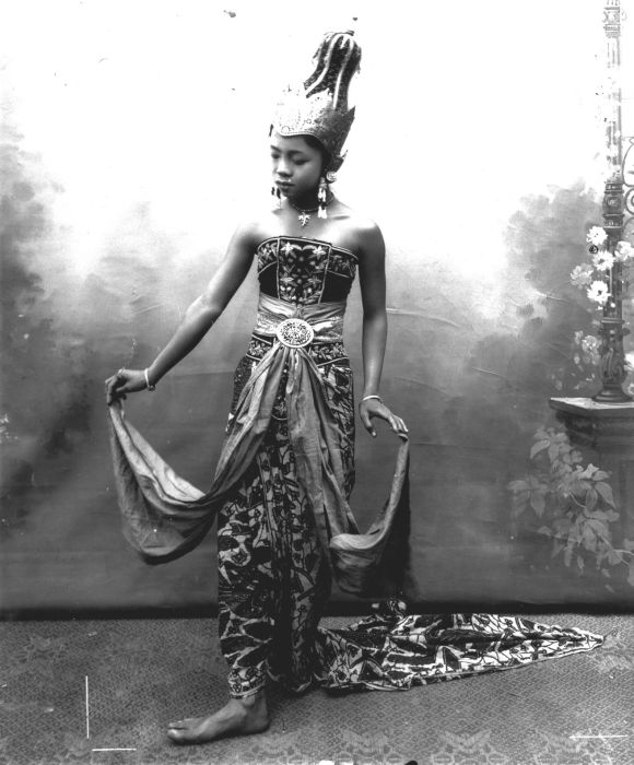 Foto. Studioportret van een wajang wong danseres